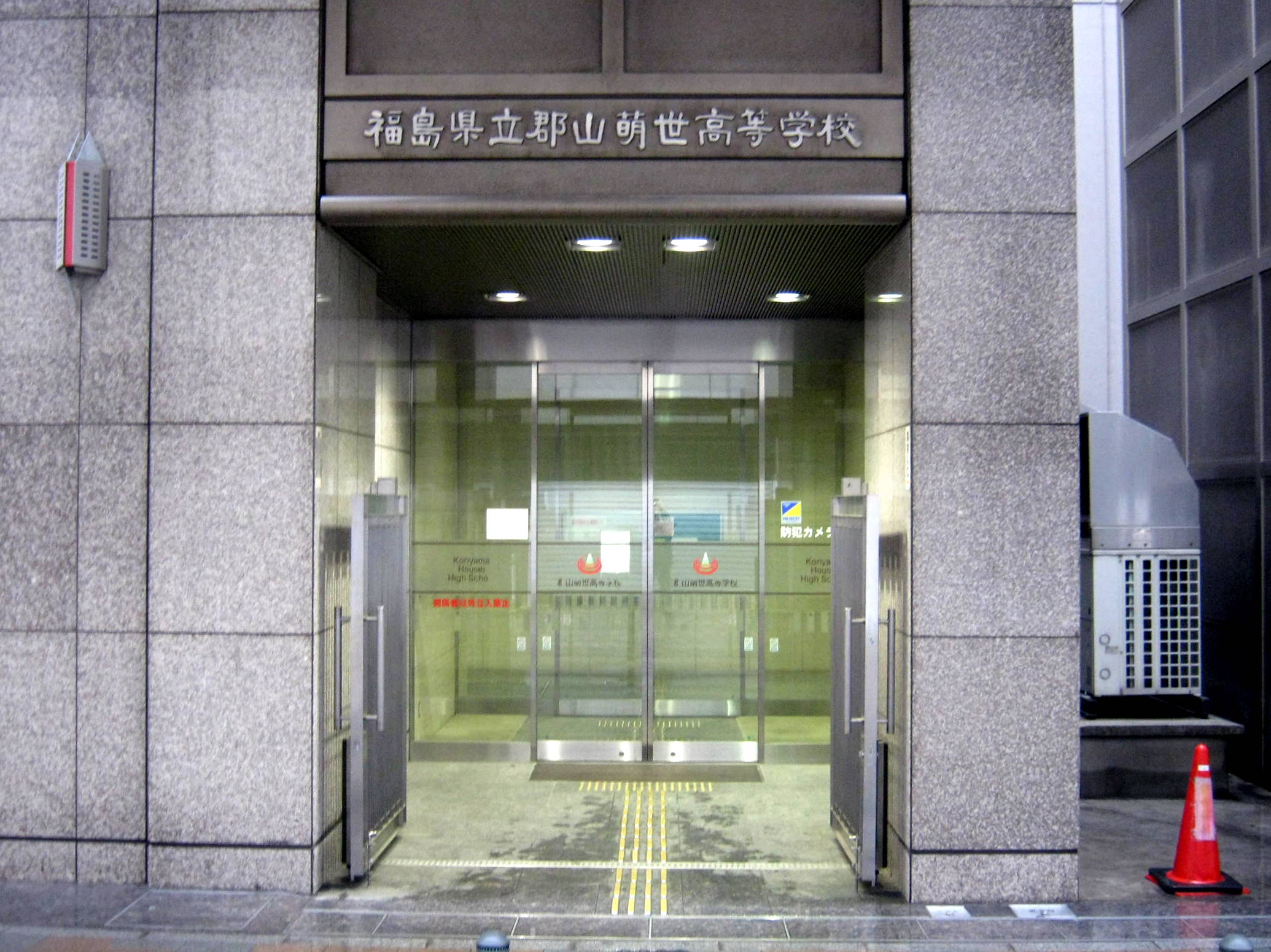 福島県立萌世高校